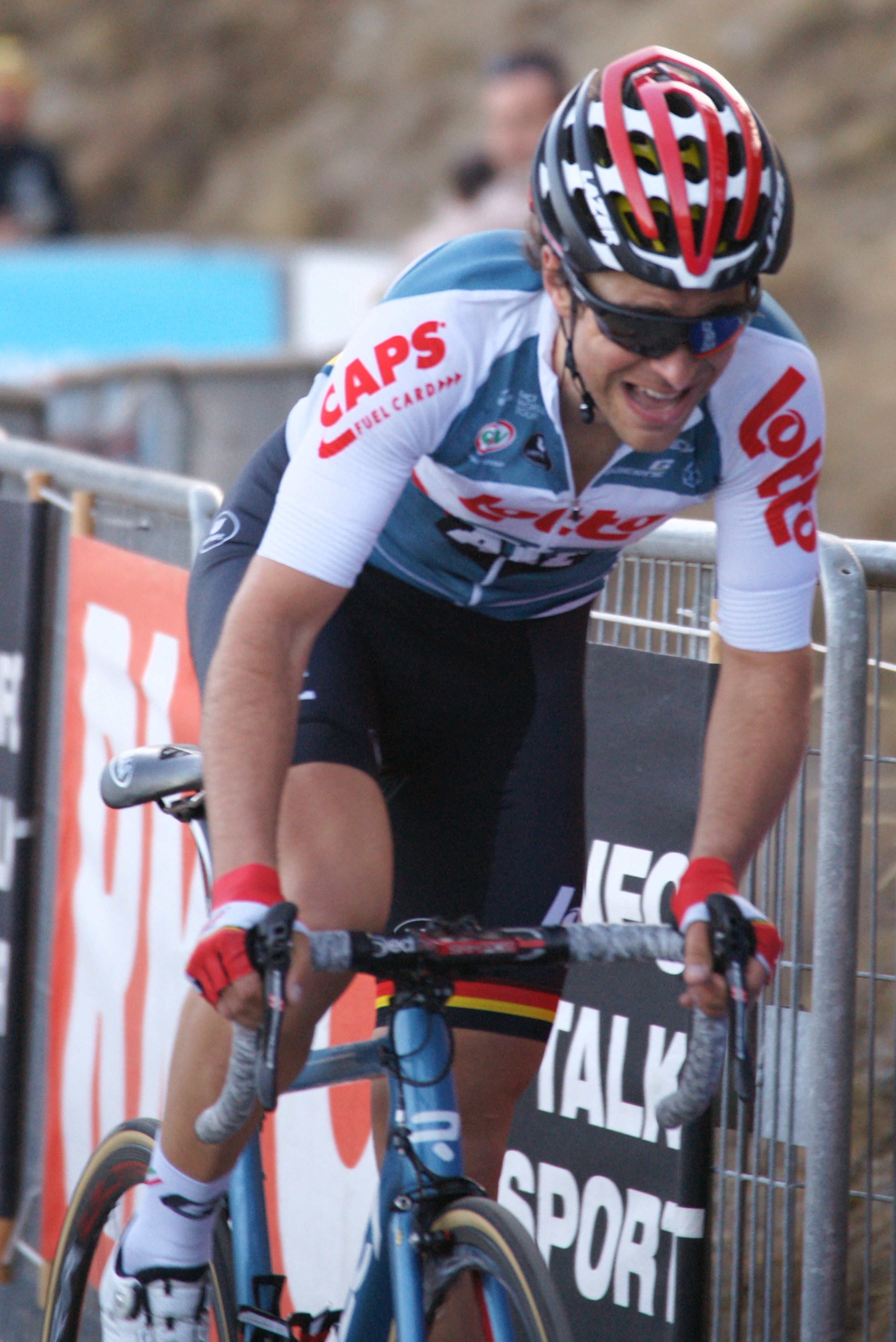 Tony Gallopin Roubion Paris-Nice 2017